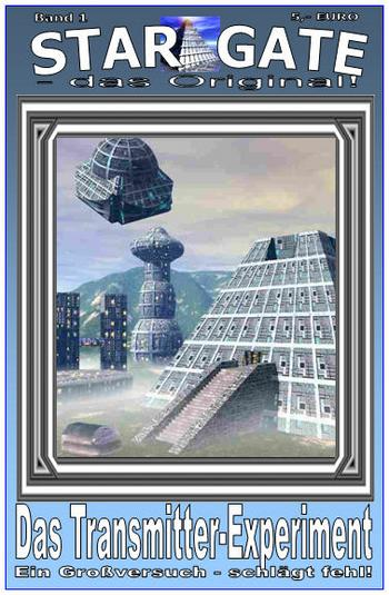 Titelbild des ersten Bandes der deutschen Science Fiction-Serie Star Gate, hrsg. Verlag Hary-Production, Zweibrücken, Deutschland